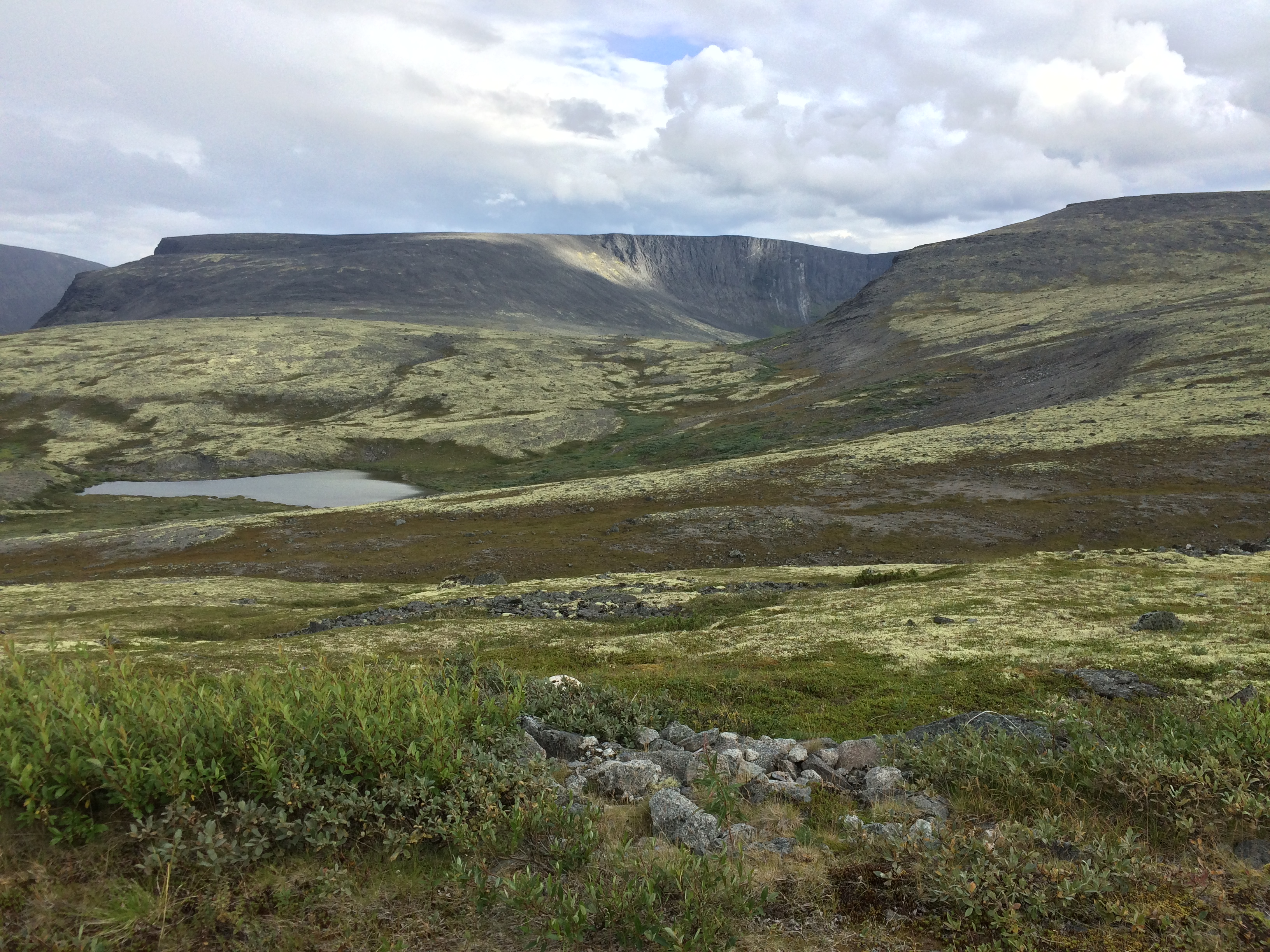 Ловозёрские тундры